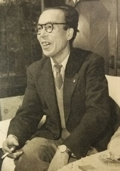 清水幾太郎